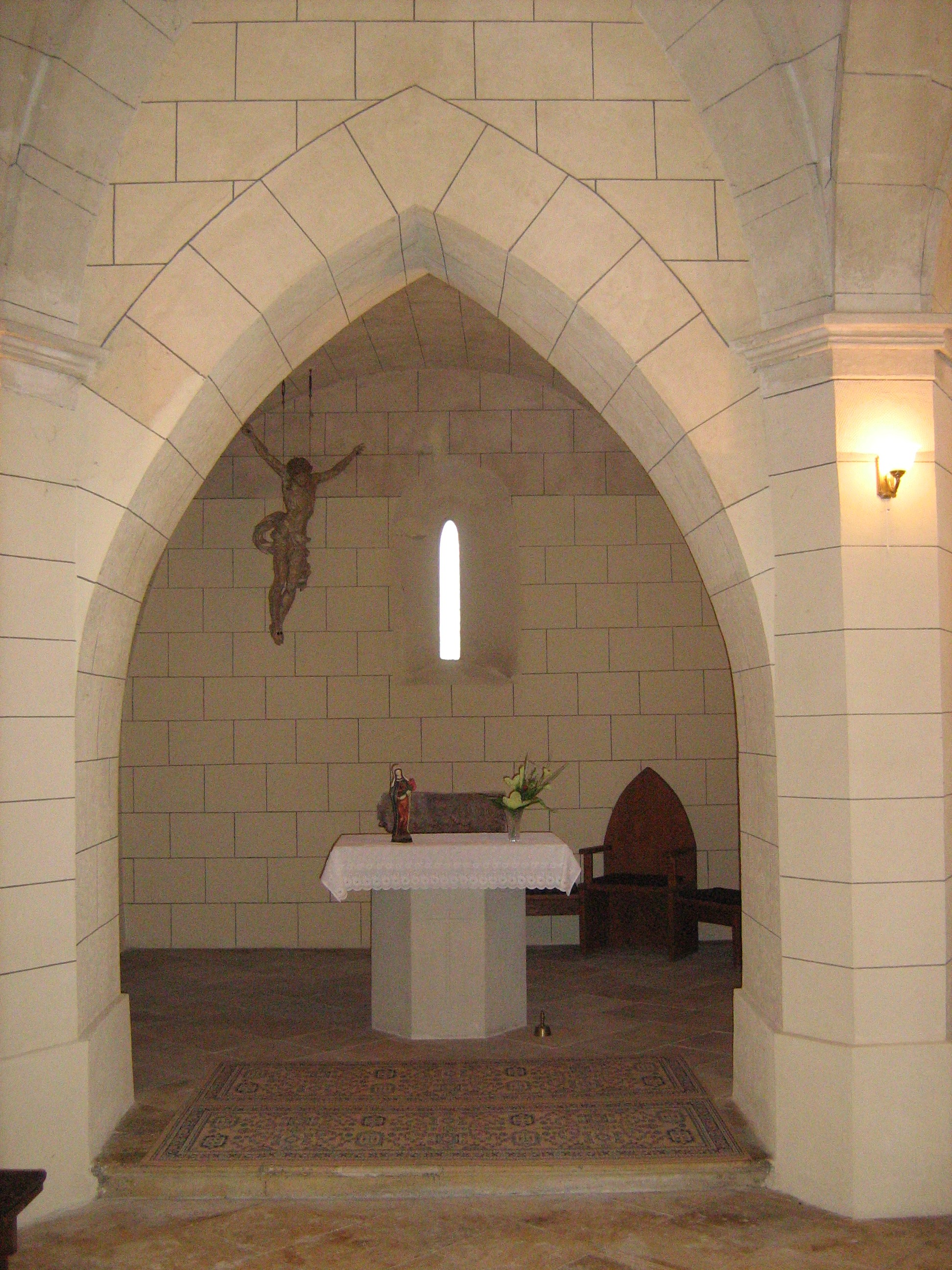 Hédervári Boldogasszony kápolna belseje.